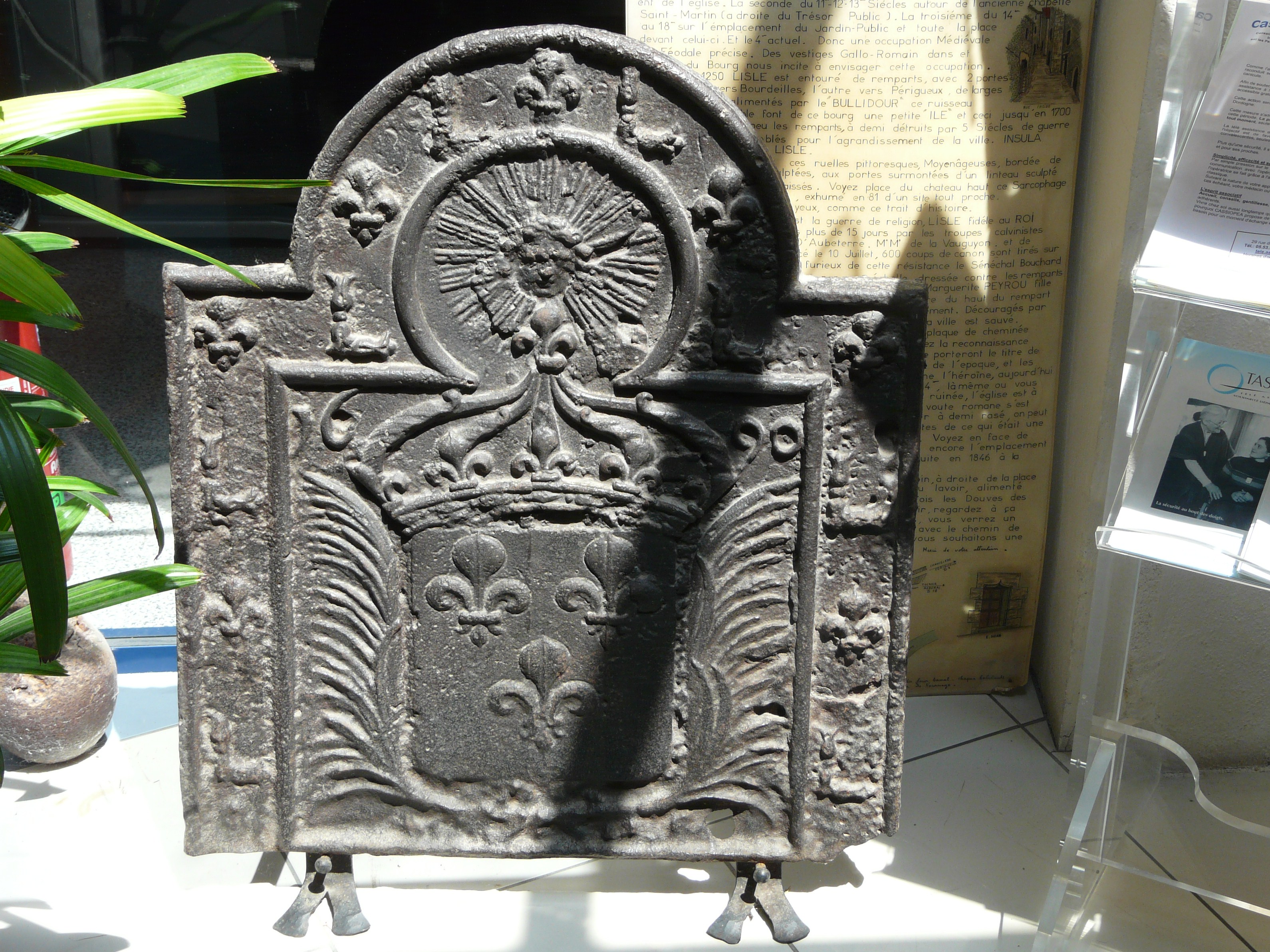 Plaque de cheminée, datée de 1690, offerte par Louis XIV à la famille de Marguerite Peyrou. Celle-ci avait en 1593 blessé mortellement le sire d'Aubeterre, calviniste, permettant la fin du siège que subissait le bourg de Lisle (Dordogne, France).